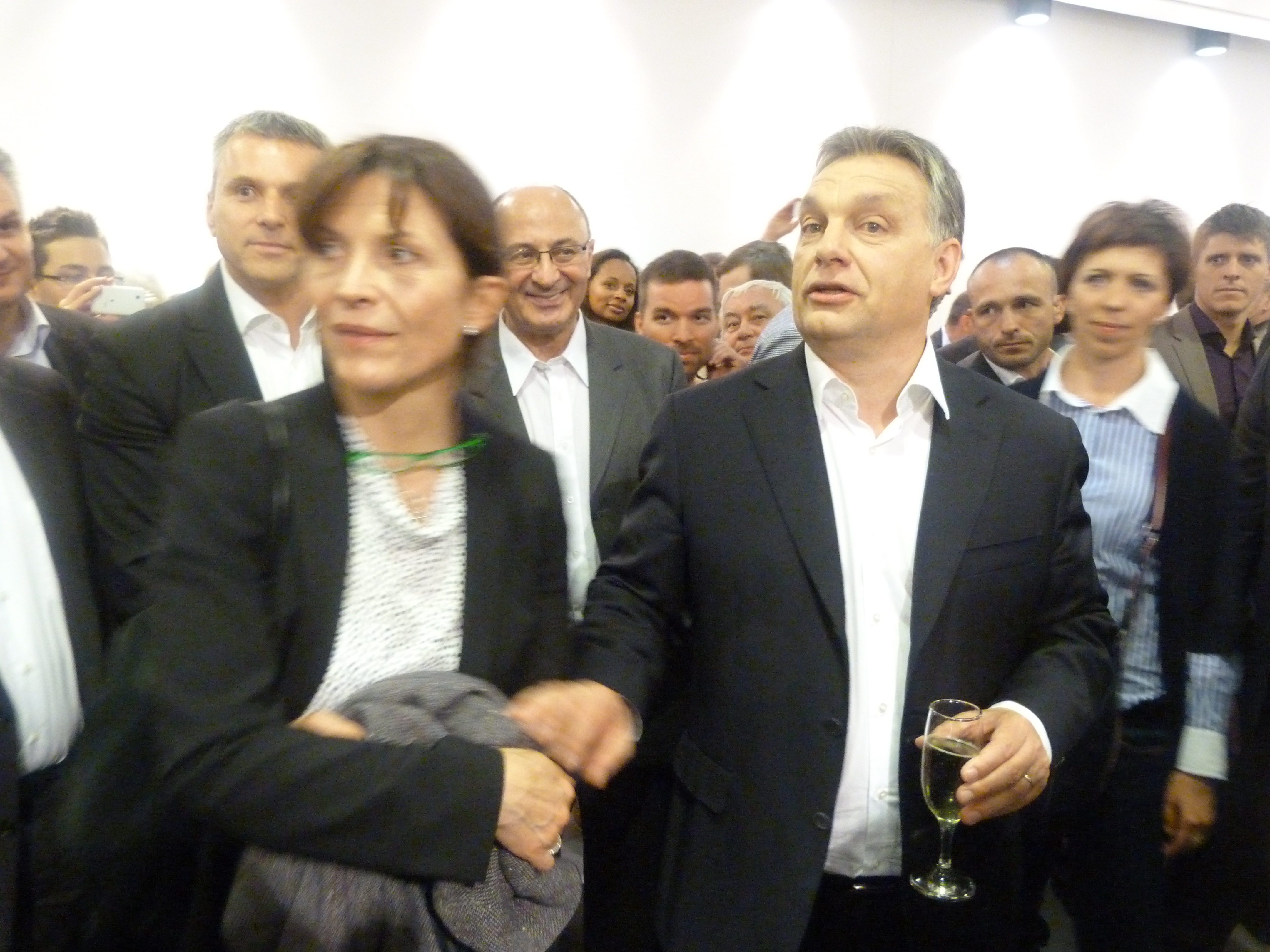 A felvétel 2014. április 6 –án, vasárnap készült Budapesten, a Bálna rendezvénytermében. Bálna Eredményváró. (1-51). Ezen a napon tartották Magyarországon az országgyűlési képviselőválasztást. A Bálna előtt gyülekezők az eredményt várták. Az ott felállított pódiumon köszönte meg a választók bizalmát Orbán Viktor. Lévai Anikó, Tőkés László, Jókai Anna, Martonyi János, Bába Iván, Szász Jenő, Gálné Pelcz Ildikó, Illés Zoltán, Andy Vajna, Bayer Zsolt, Pataky Attila, Vidnyánszky Attila, Sára Sándor. A választáson a FIDESZ-KDNP pártszövetség 2010 után újra kétharmados többséget szerzett a választáson. Képviselői helyek: FIDESZ-KDNP : 133, MSZP–Együtt–DK– PM–MLP: 38, Jobbik: 23, LMP: 5 képviselői hely. Az országos listákra leadott szavazatok száma: Fidesz–KDNP 2 264 730, MSZP–Együtt– DK–PM–MLP: 1 290 804, Jobbik 1 020 476, LMP: 269 413. Forrás: FIDESZ-KDNP: újra kétharmad hozzáférés: 2014.04.14 ©© Derzsi Elekes Andor, Budapest, 2014, A kép és filmfelvételek egészben, vagy részletekben másolását, bármilyen úton történő sokszorosítását és felhasználását a szerző ellenérték nélkül, jogutódjaira is kihatóan megengedi. Az engedély kiterjed a kereskedelmi célú hasznosításra is. Kéri azonban nevének feltüntetését a felhasználás során. A Metapolisz sorozat valamennyi képe és filmje Creative Commons alatti valamint kereskedelmi - for profit - célra is felhasználható. Ajánlott hivatkozás: Derzsi Elekes Andor: Metapolisz DVD line